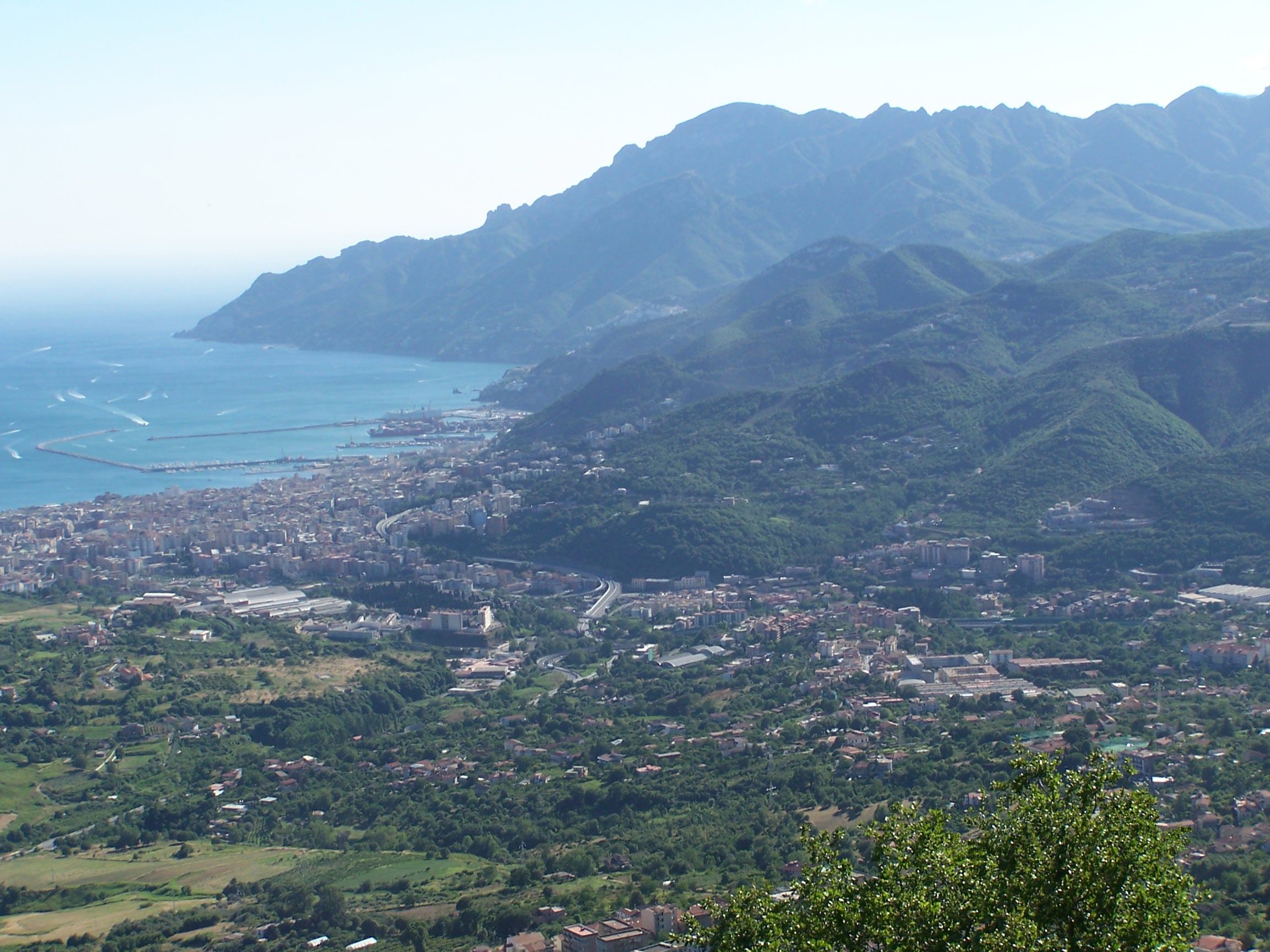 Panorama di Salerno dal Montestella nell'area Nord del Comune. Foto personale. Salerno, 2005.